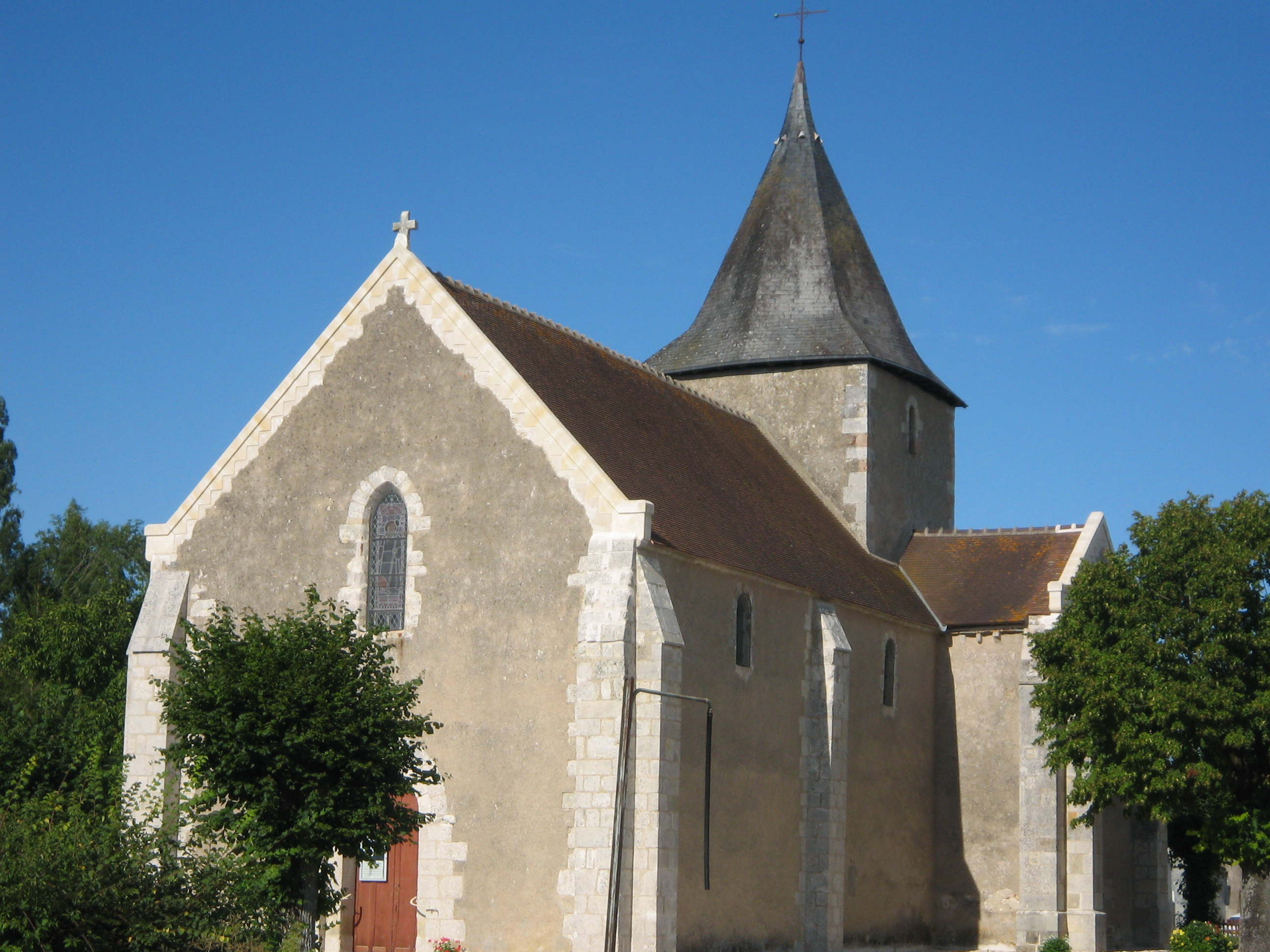 Eglise Saint Martin, XIe, Limeux (Cher)